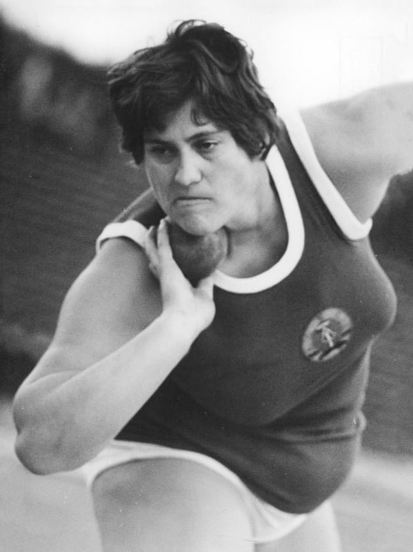 Renate Garisch Zentralbild Wendorf 22.09.1964 Spitzensportler der DDR. UBz: Renate Garisch vom SC Empore Rostock in Aktion.